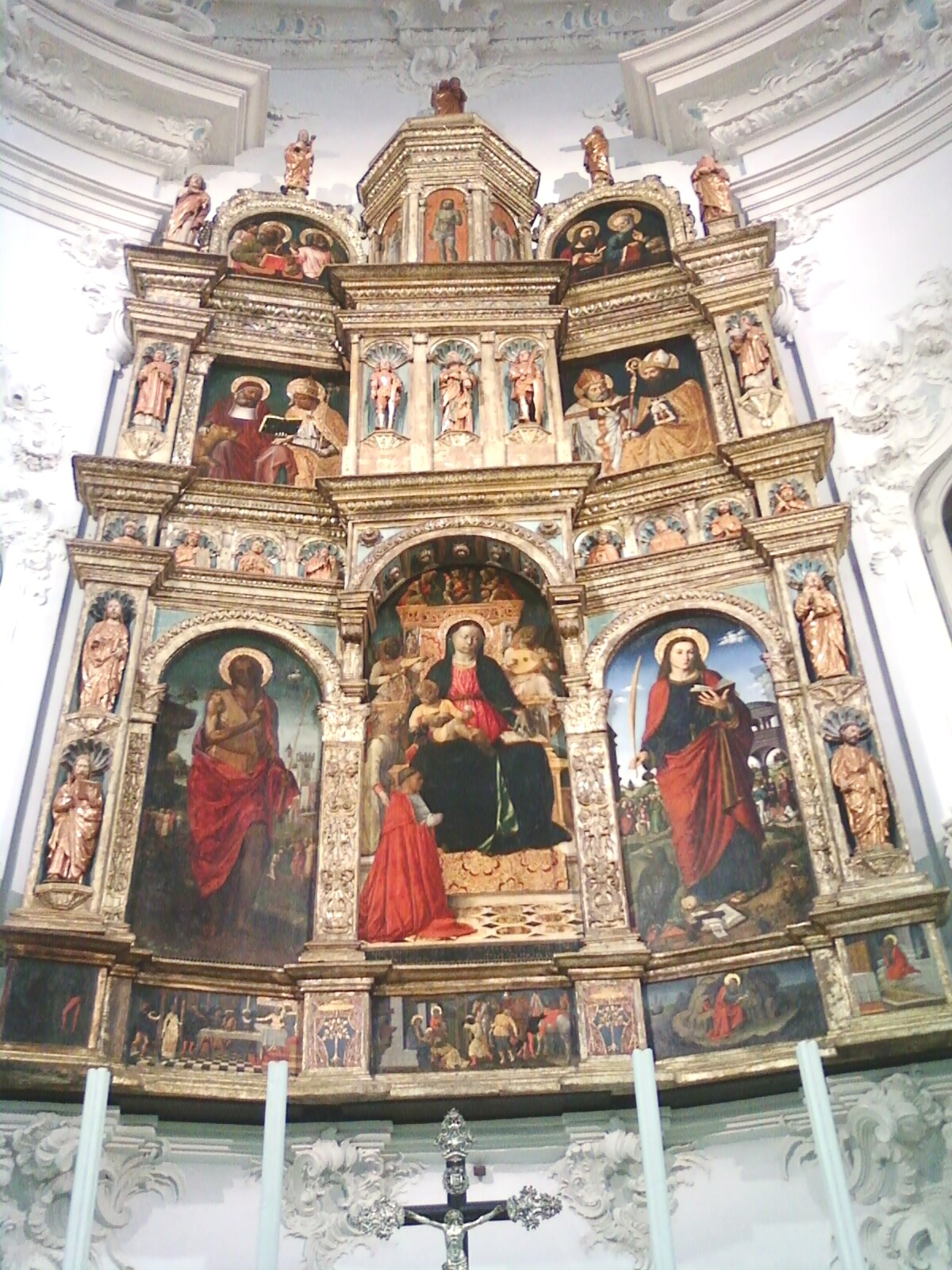 Polittico della distrutta cattedrale di Savona conservato nell'oratorio di N.S. di Castello in Savona (Italy)